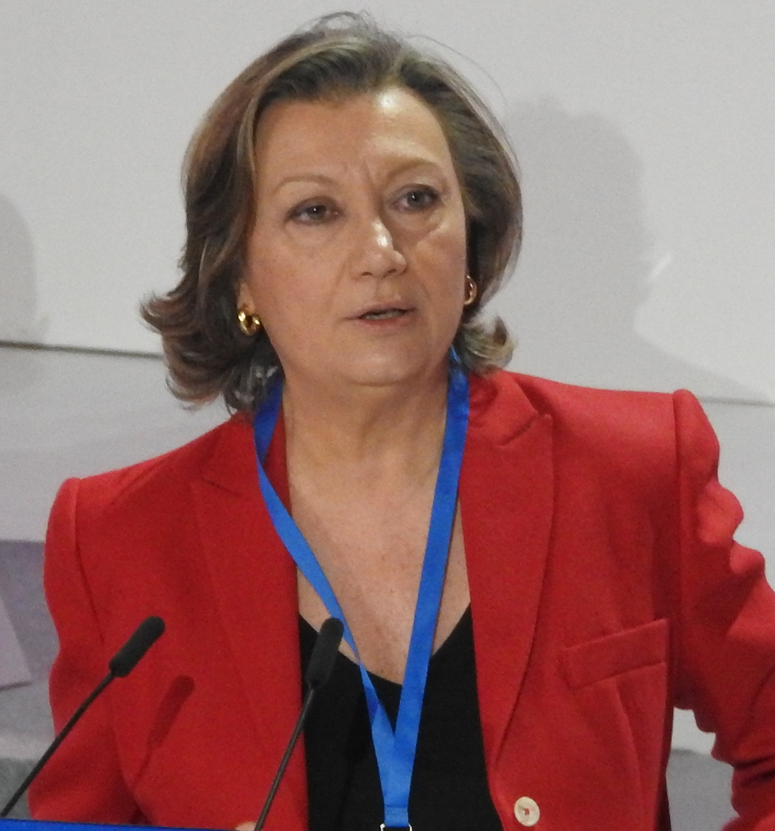 Luisa Fernanda Rudi en février 2017.